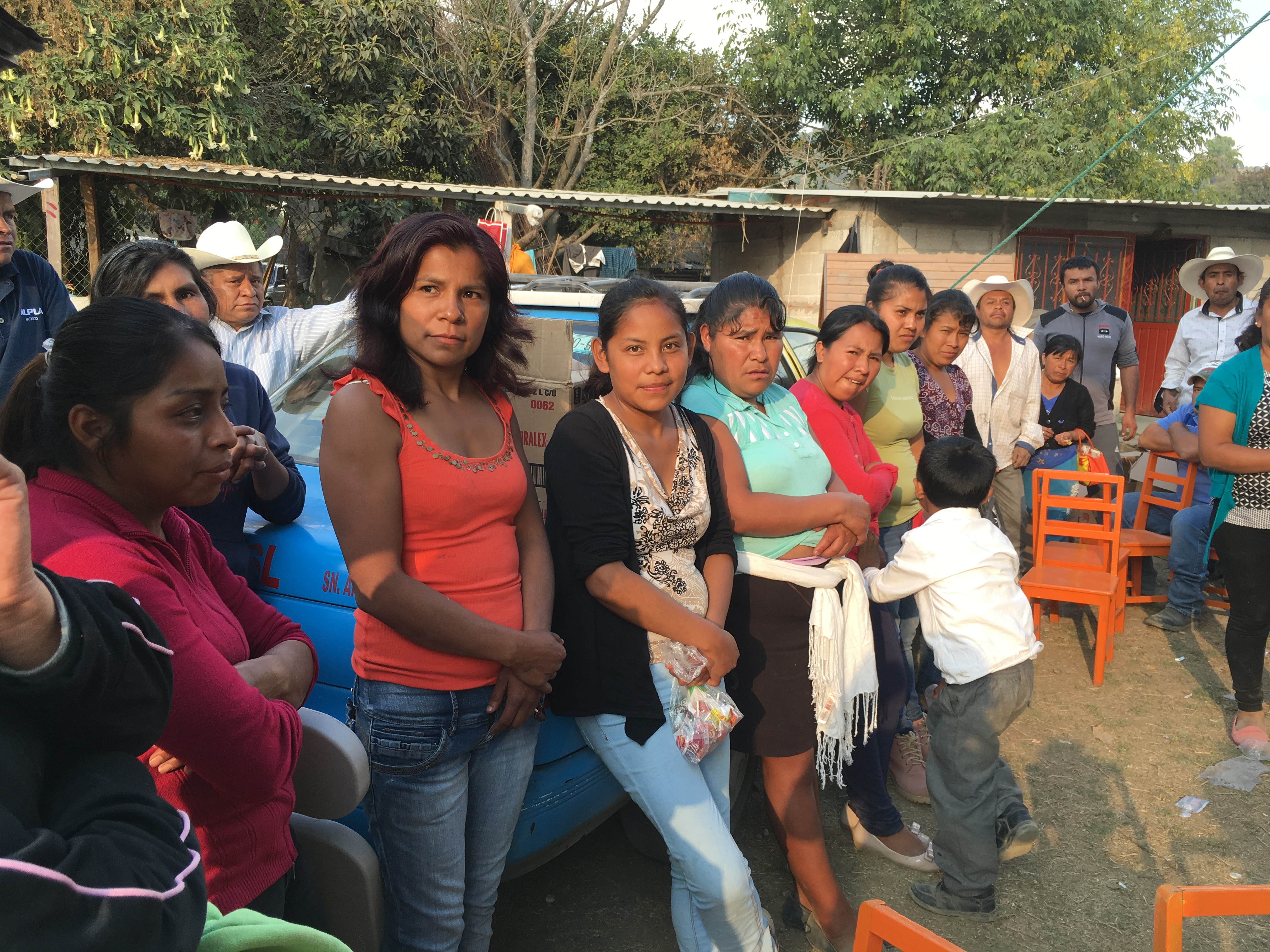 Colectivo de mujeres, que a raíz del sismo de 2017, fueron las primeras en organizarse para la obtención de recursos que les permitieran la reconstrucción de las escuelas dañadas.